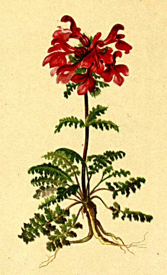 Pedicularis verticillata